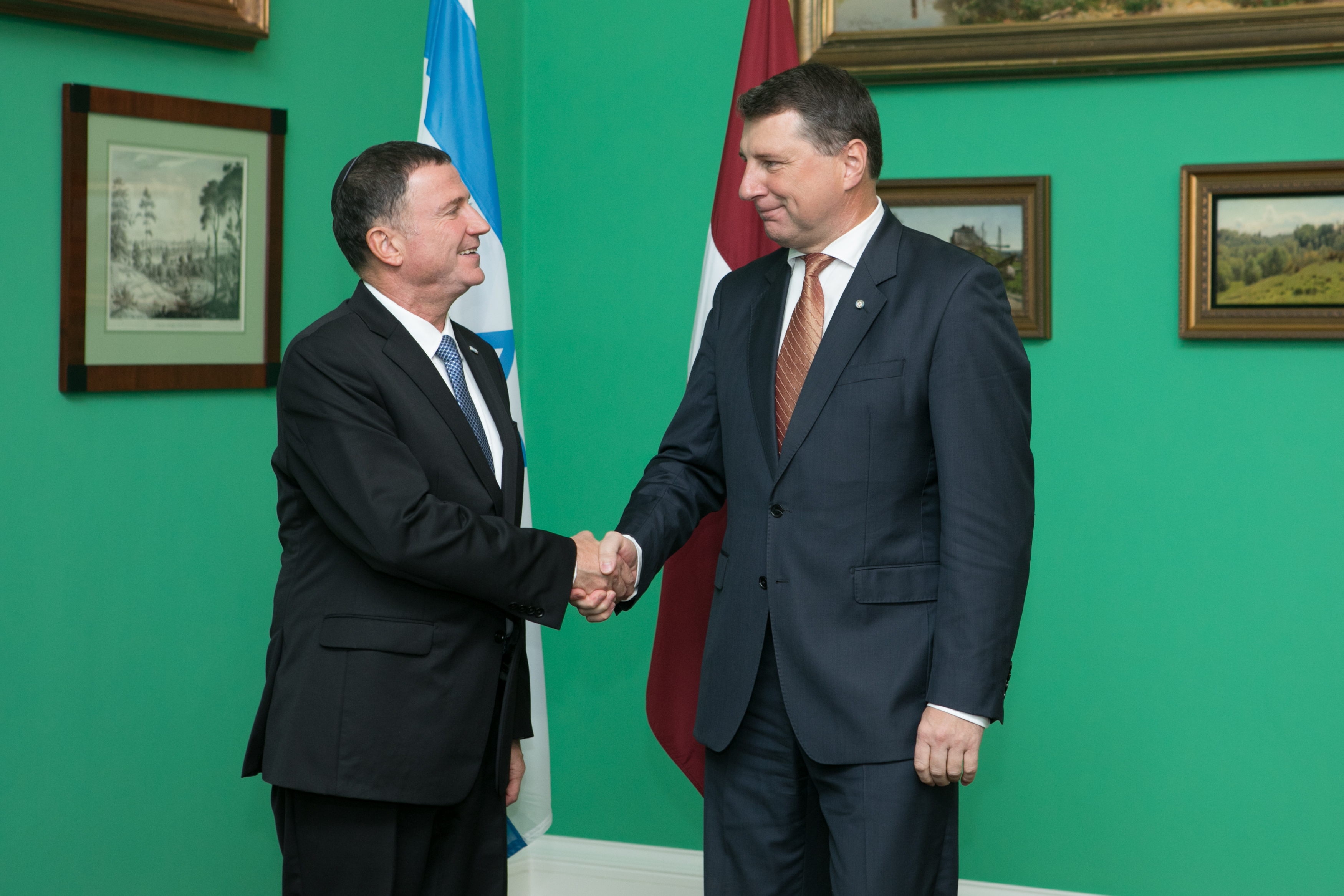 2017.gada 11.septembris. Izraēlas Valsts Kneseta priekšsēdētājs Jūlijs Joels Ēdelšteins (Yuli-Yoel Edelstein) tiekas ar Latvijas Valsts prezidentu Raimondu Vējoni. Foto: Ernests Dinka, Saeimas Administrācija Izmantošanas noteikumi: saeima.lv/lv/autortiesibas